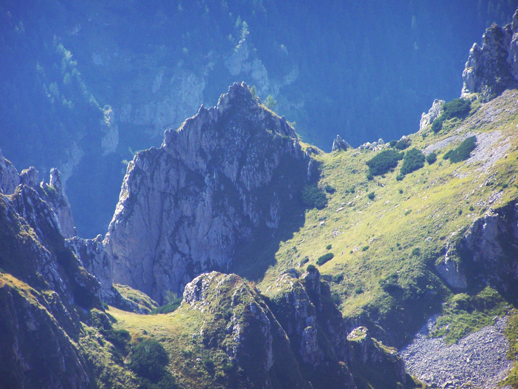 Niska Turnia (Czerwone Wierchy, West Tatra Mountains)